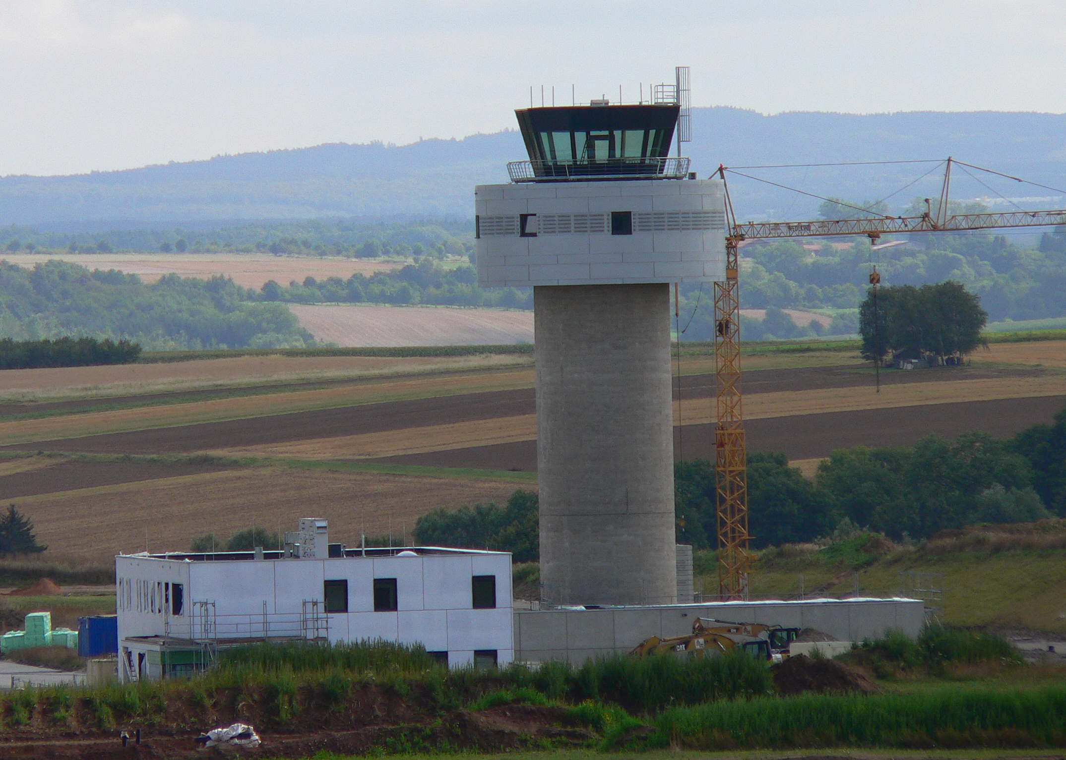 Flugplatz Kassel-Calden, Tower des neuen Regionalflughafens in Bau